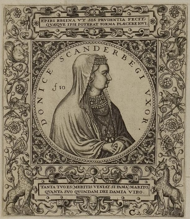 Grafik aus dem Klebeband Nr. 1 der Fürstlich Waldeckschen Hofbibliothek Arolsen Illustration aus: Georg Greblinger: Wahre Abbildungen der Türckischen Kayser vnd Persischen Fürsten / so wol auch anderer Helden und Heldinnen von dem Osman / biß auf den andern Mahomet. Johann Ammon, Frankfurt 1648 Motiv: "Donice Scanderbegi uxor" (Donika Kastrioti, Skanderbegs Ehefrau)